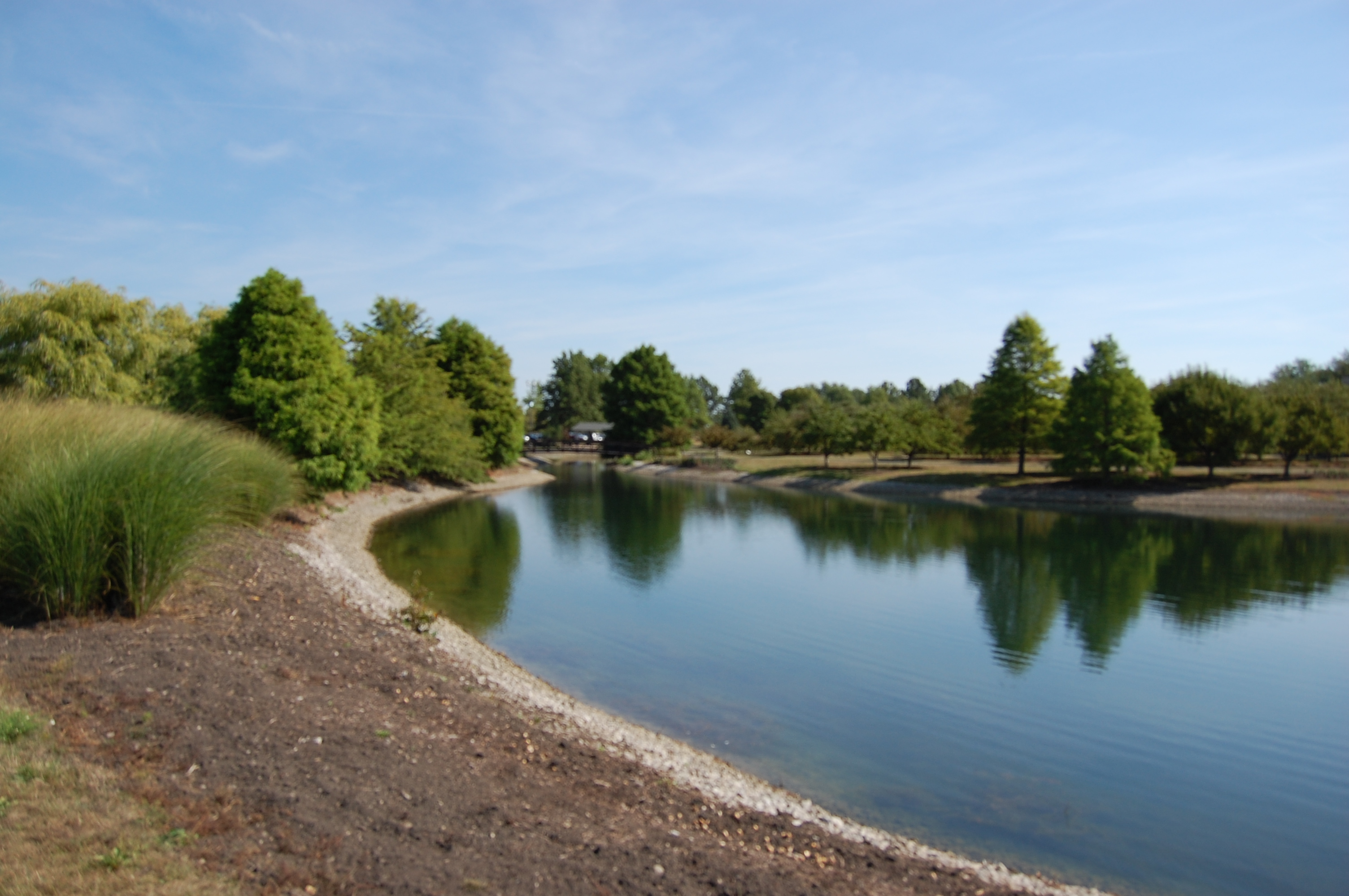 BGSU Firelands 2 071